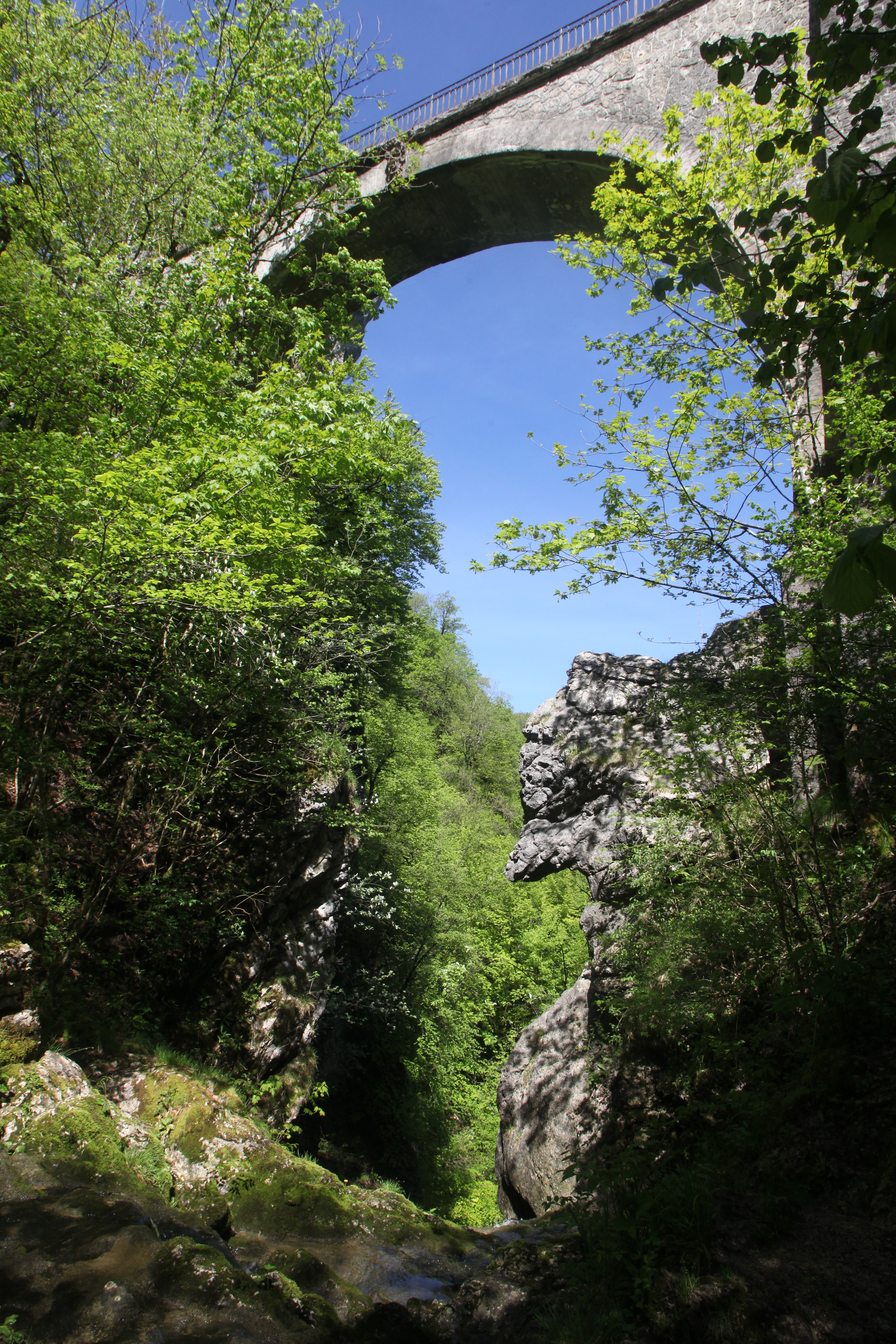 Pont du Diable entre Crouzet-Migette et Sainte-Anne (Doubs).